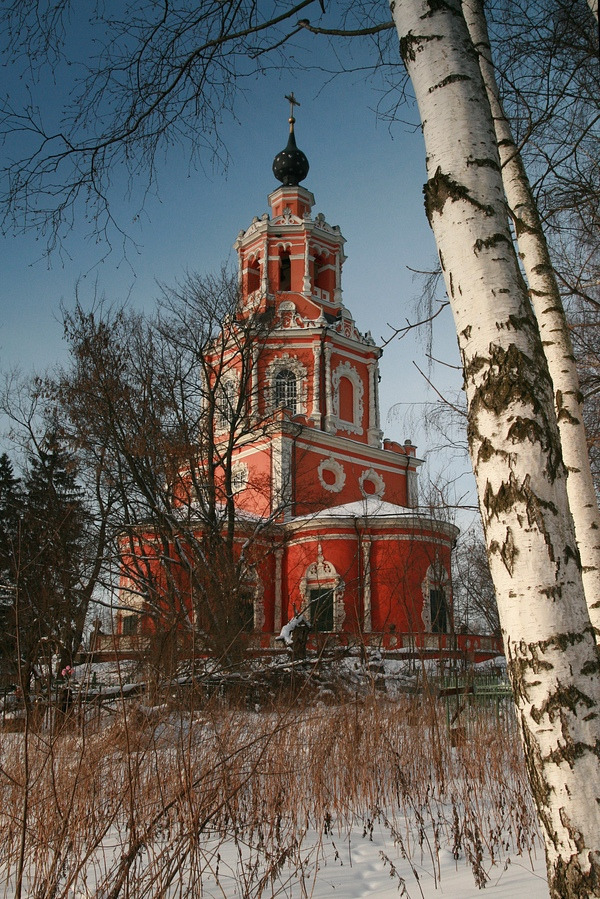 Спасская церковь в селе Уборы. Подмосковье.